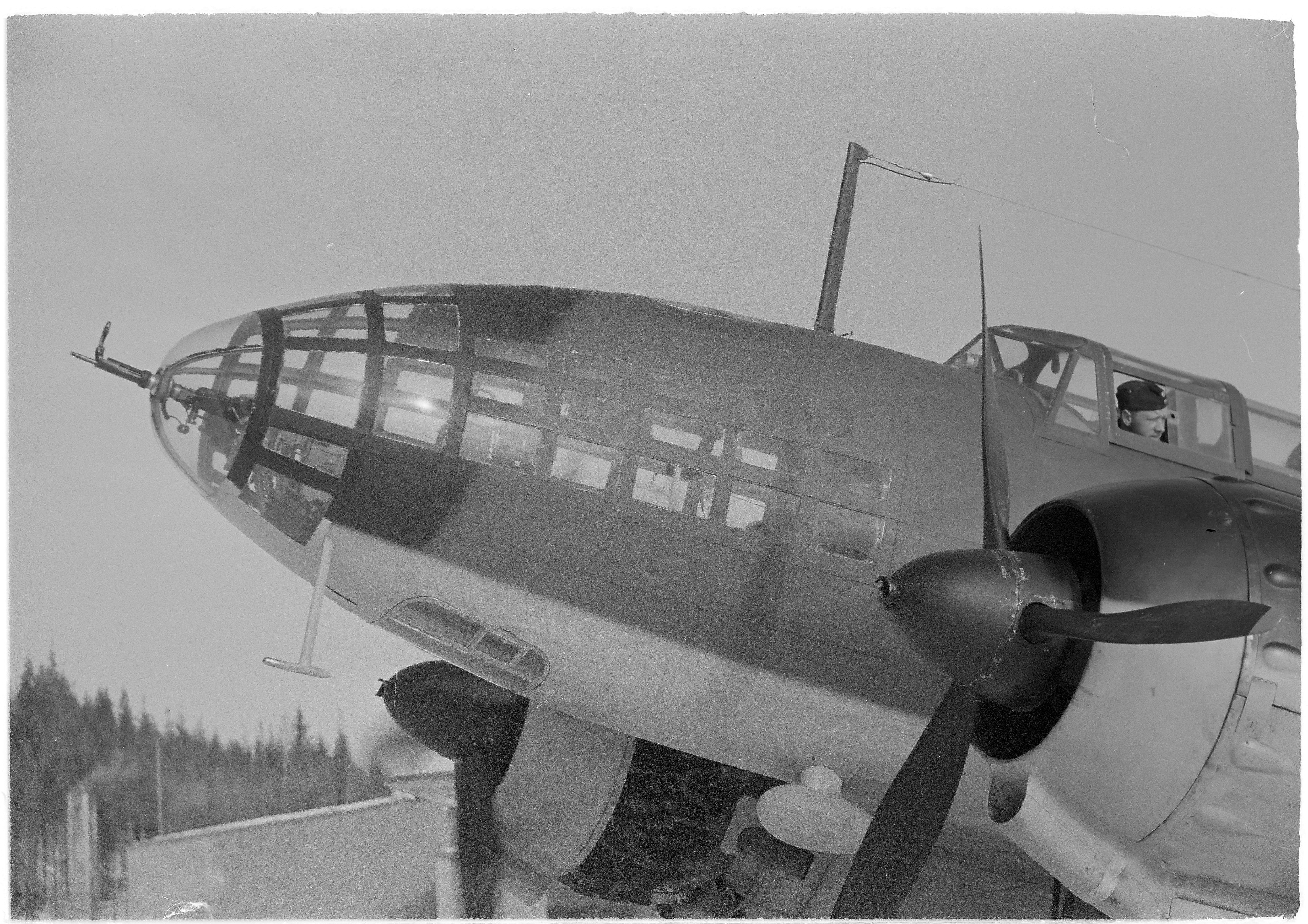 DF-koneen nokka. (Kuvassa on Iljushin DB-3F (Il-4)). Kuvauspaikka: Luonetjärven lentokenttä